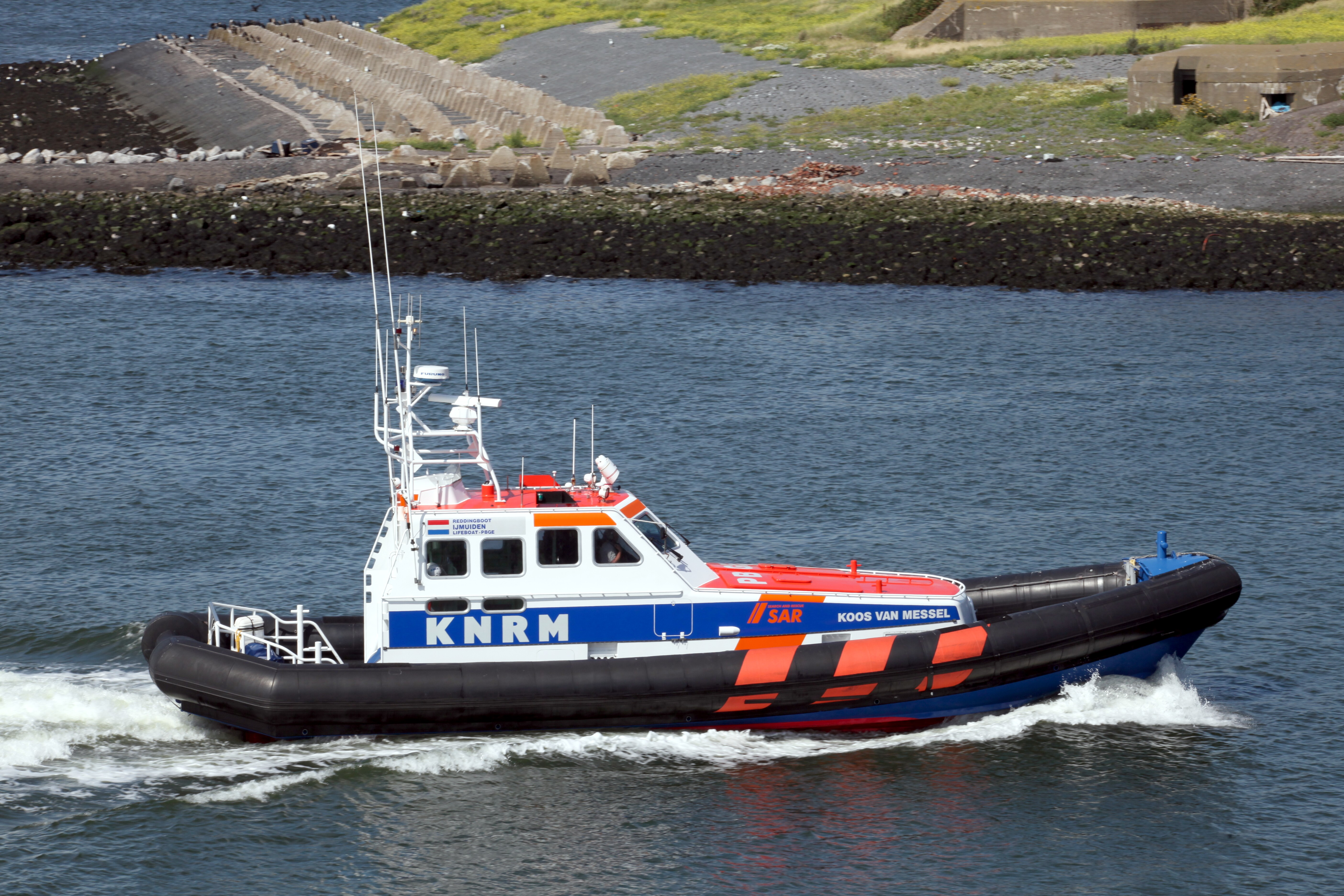 KNRM lifeboat Koos van Messel IJmuiden build 2003